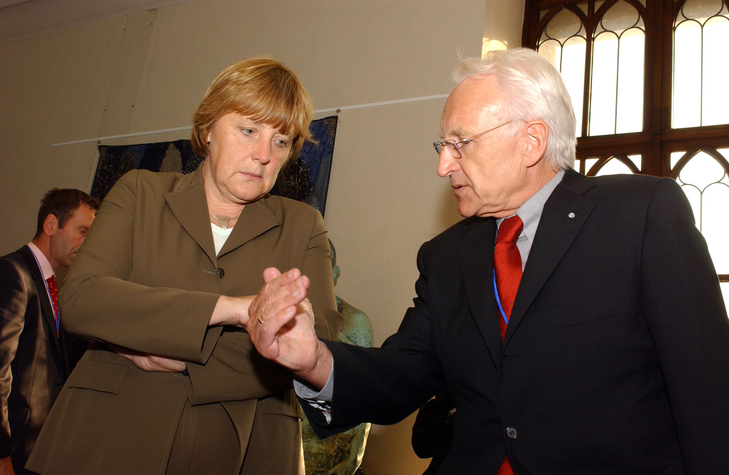 EPP Summit Meise 16-17 June 2004